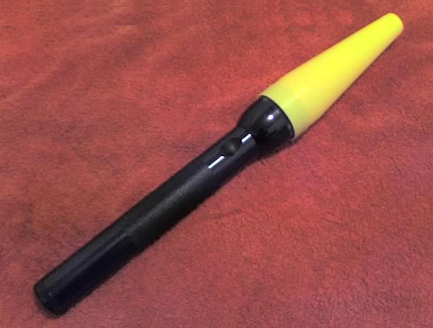 Imagem de coleçao propria, obtida atraves de camera, nao retirado da web.obtido atraves de fotos de acervo da minha coleçao e gentilmente cedidas para a Wikipedia por mim mesmo e estando livre para qualquer finalidade ligada ao uso de coleçao ou simpatia a mesma.